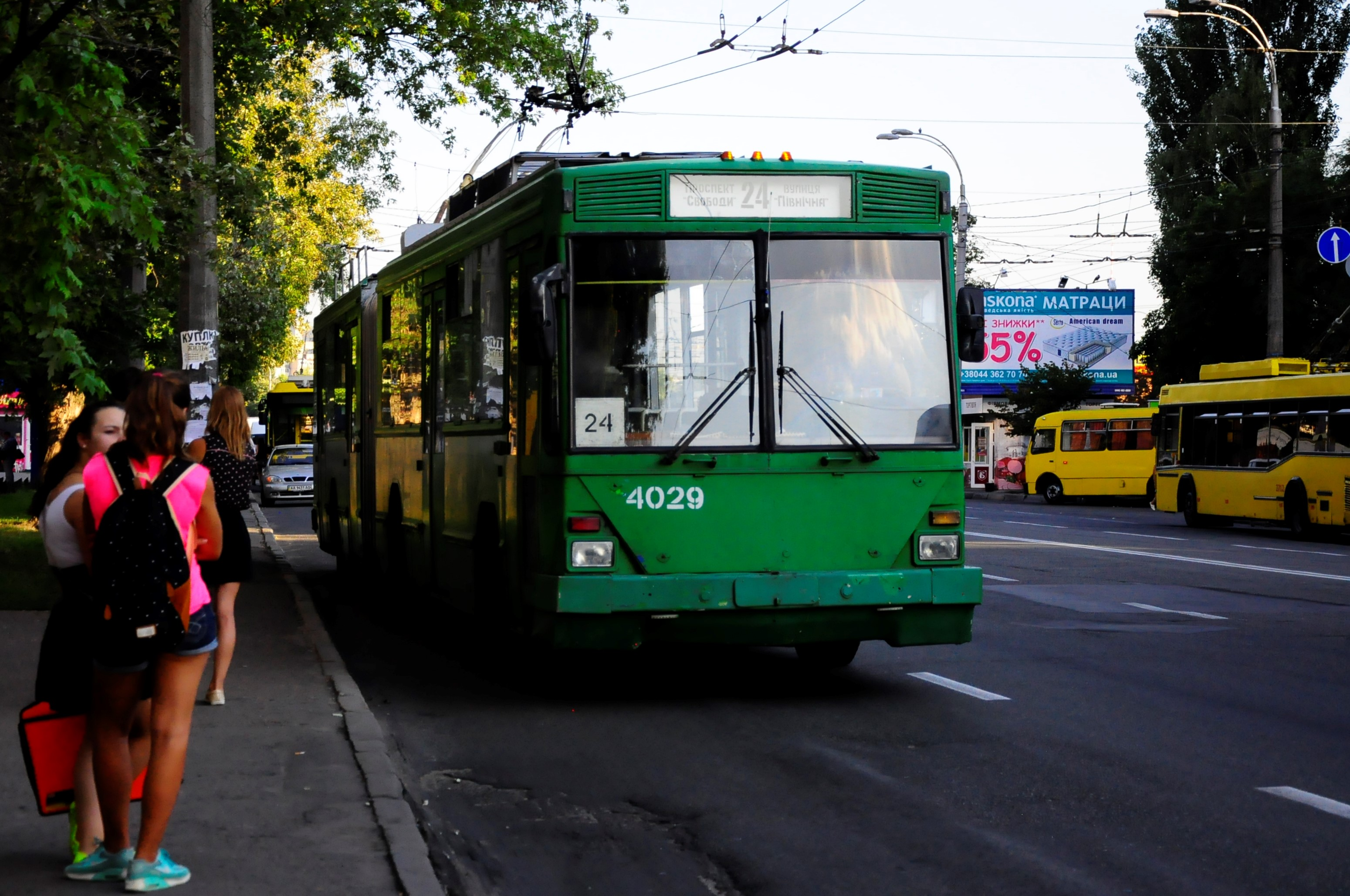 Тролейбус Київ-12.03 №4029 на кінцевій зупинці "проспект Свободи" (маршрут 24)